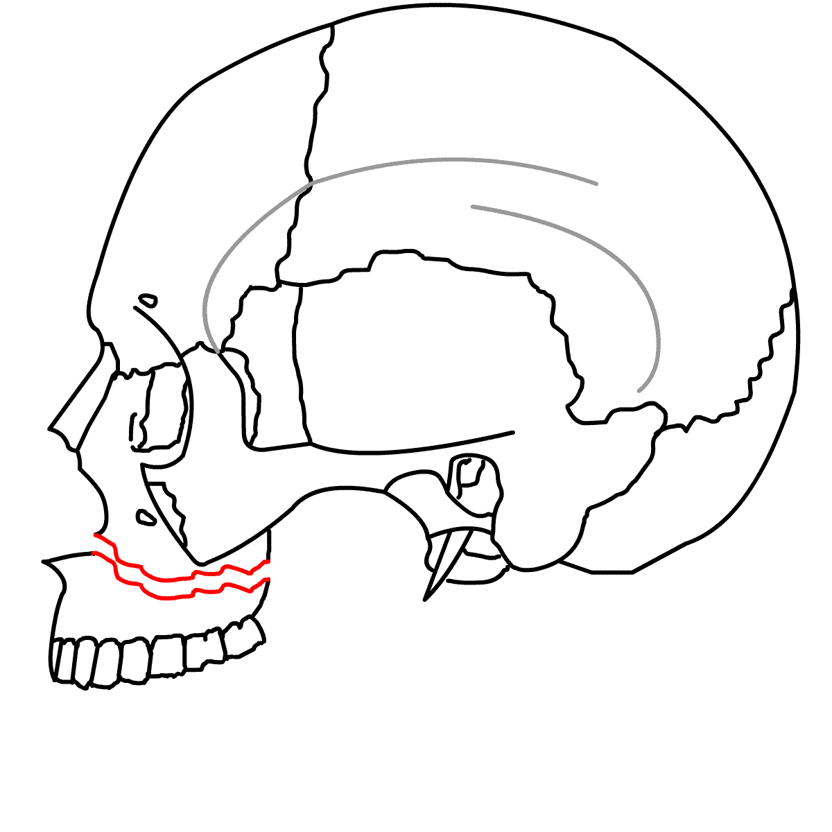 Le Fort 1 Fracture